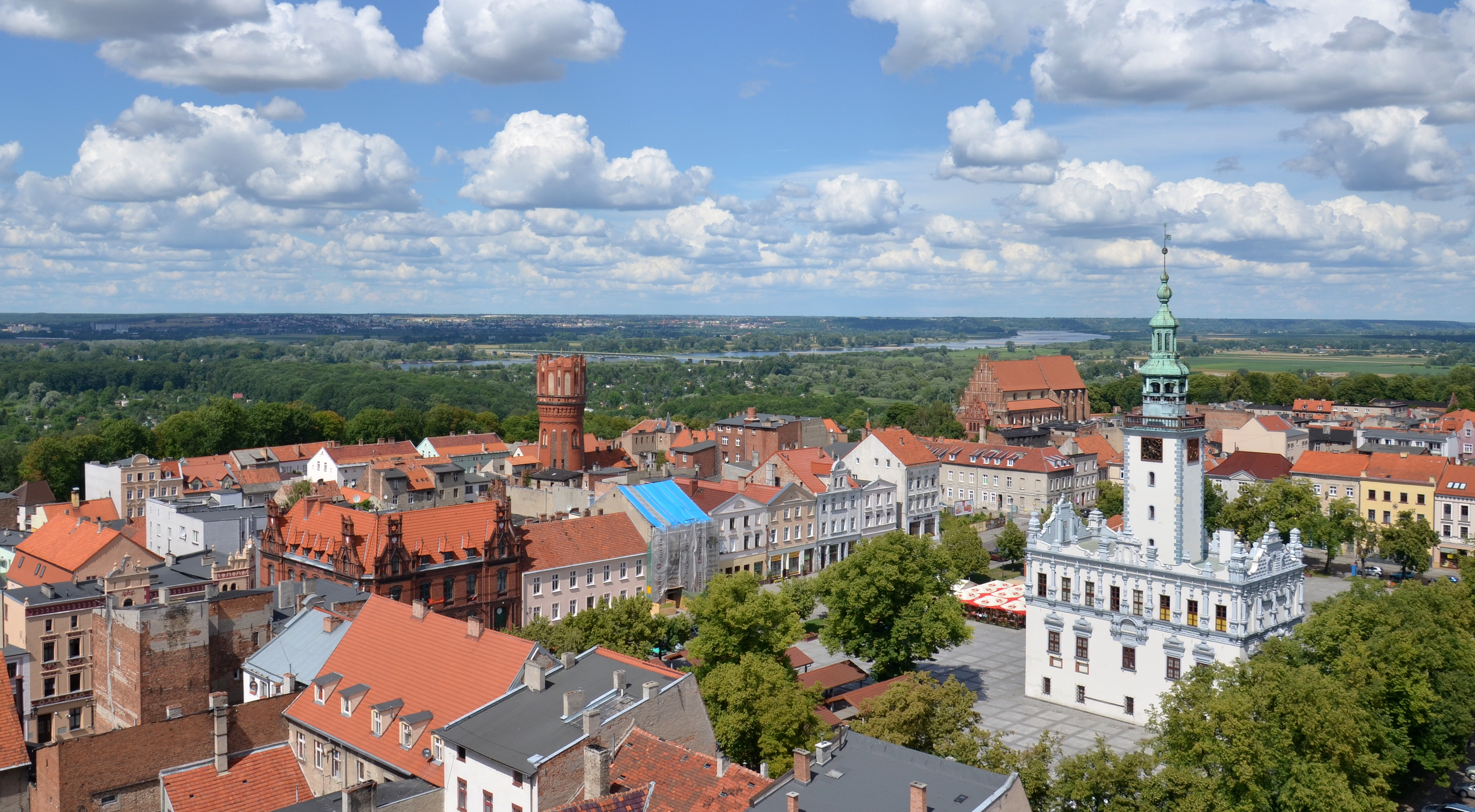 Chełmno, widok z wieży kościóła Wniebowzięcia Najświętszej Maryi Panny na Rynek